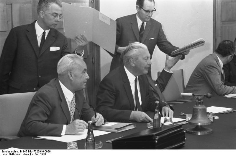 CDU-Präsidium bei Bundeskanzler Kiesinger